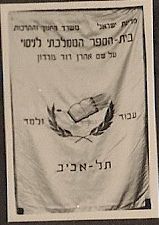 דגל בית הספר א.ד.גורדון תל אביב